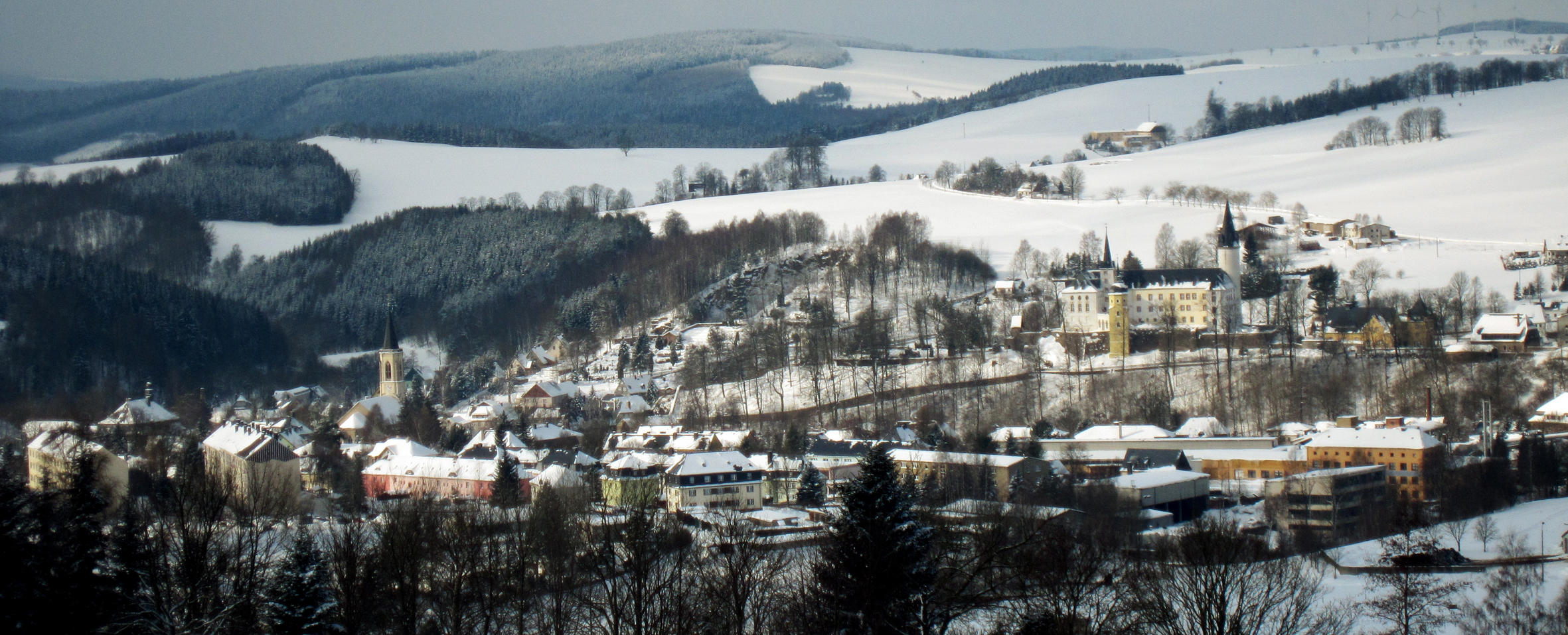 Neuhausen im Erzgebirge Ortsansicht Februar 2010